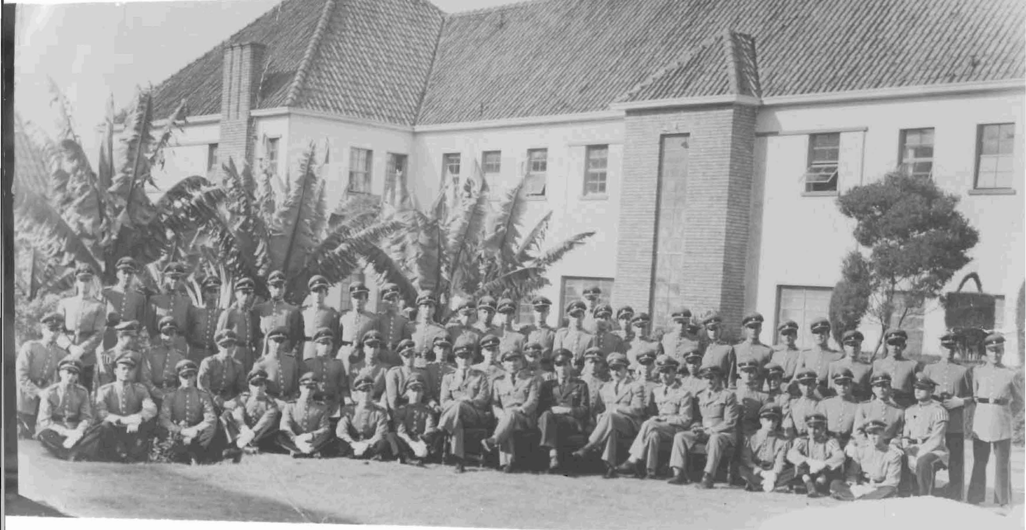 Curso de Cadetes Carlos Holguin (1.951) Graduados 76